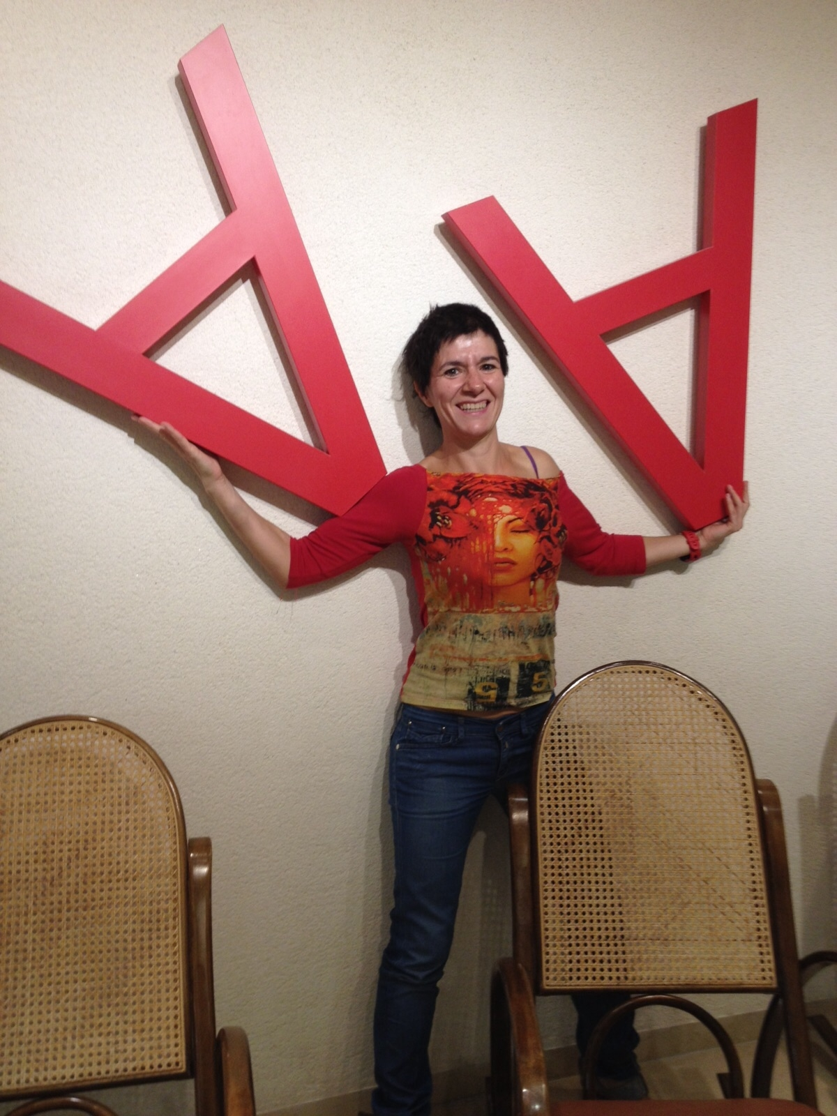 Inauguració de la 15a edició del Correllengua a Olesa de Montserrat